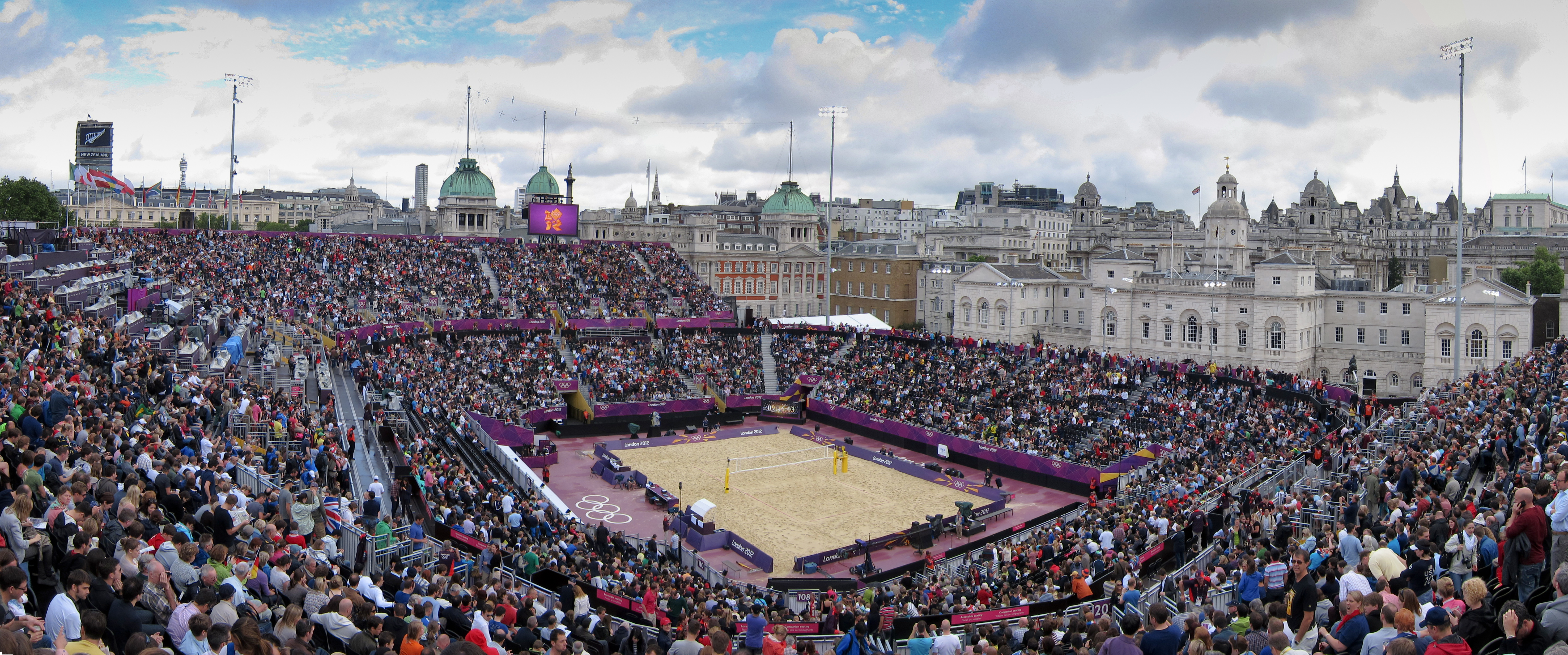 Beach volleyball